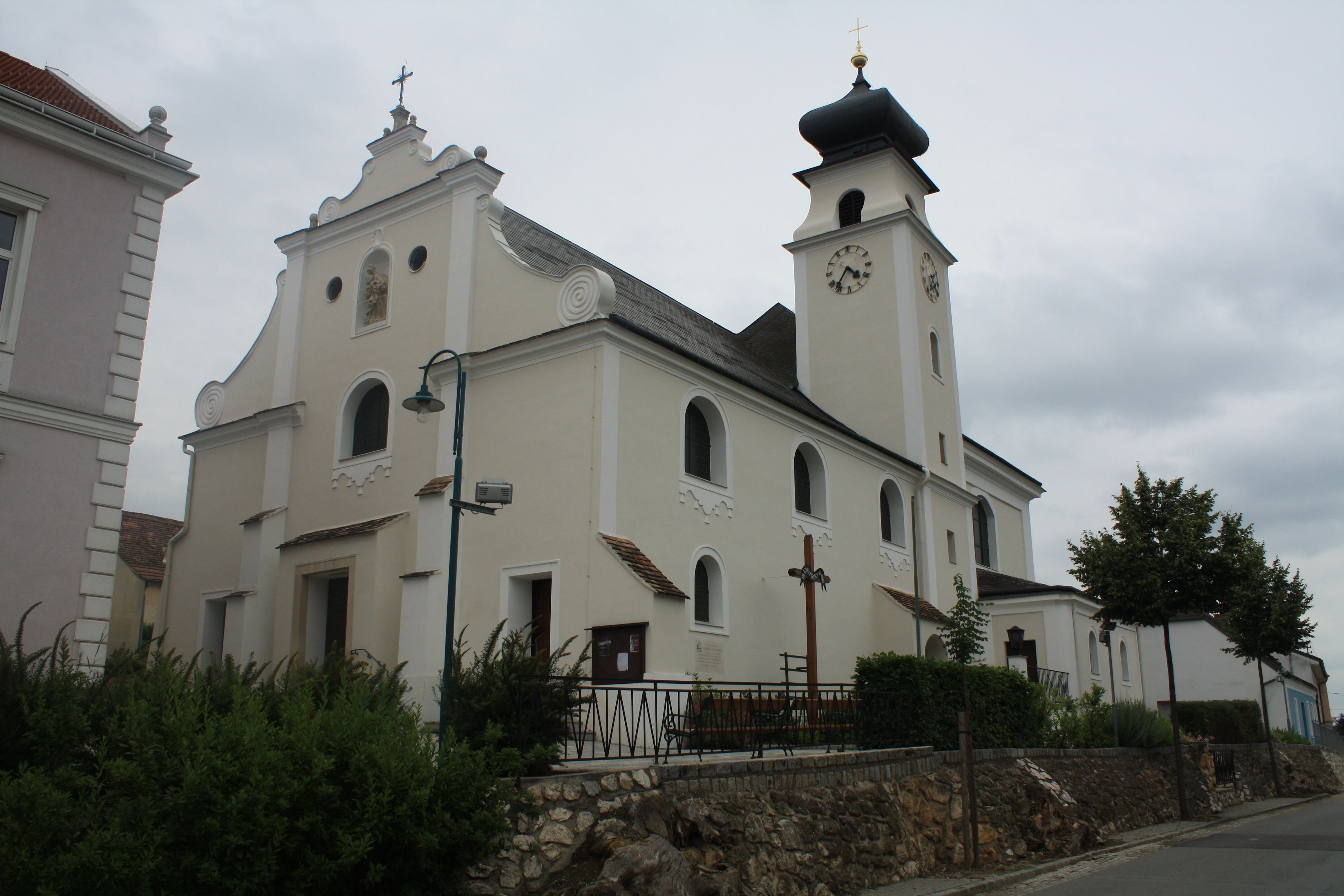 Kirche von Herrnbaumgarten in Niederösterreich